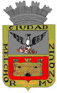 Escudo del municipio de Múzquiz, Coahuila